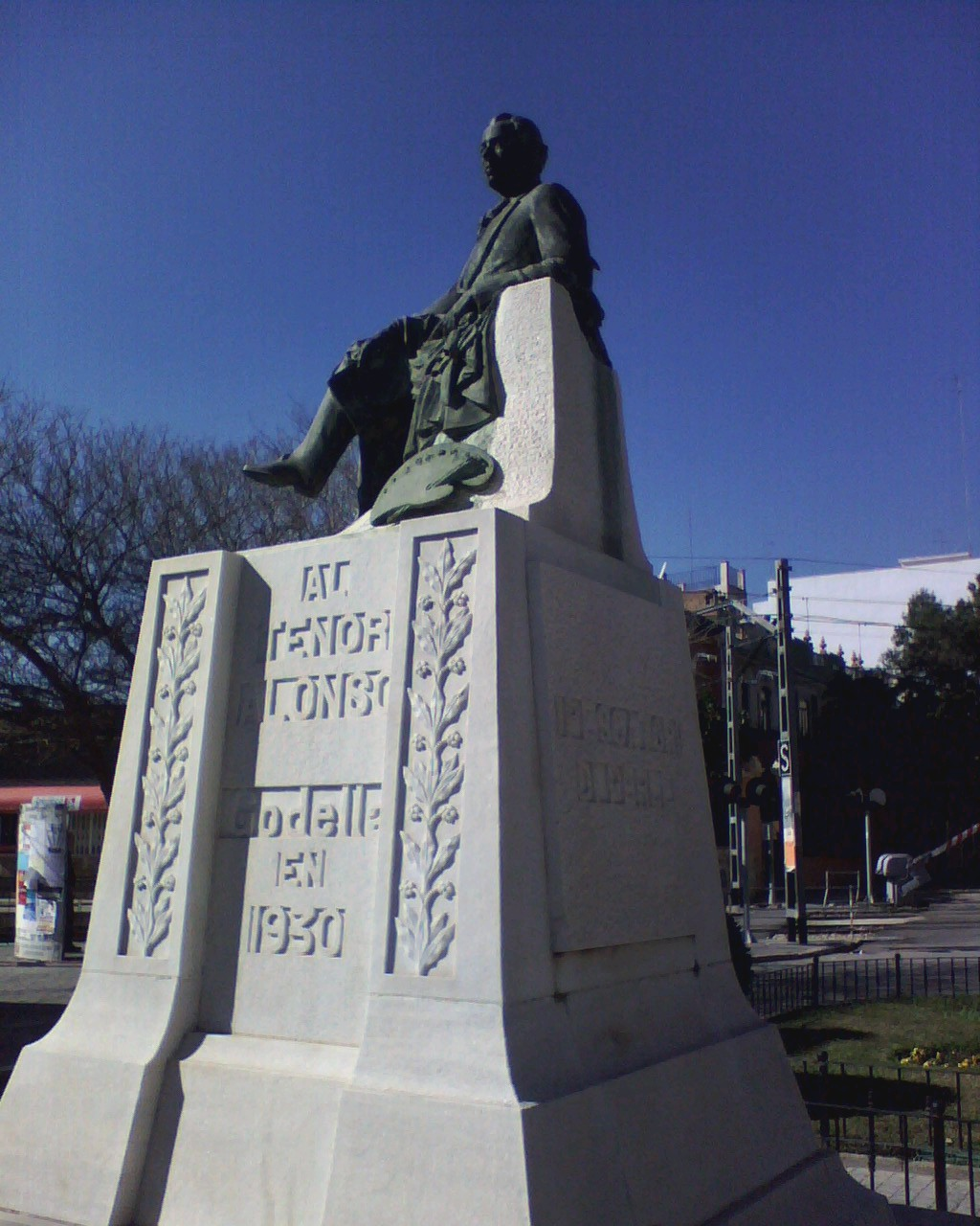 Estatua en bronce del tenor Lamberto Alonso. Obra de Ignacio Pinazo Martínez (1930) Godella, Valencia.